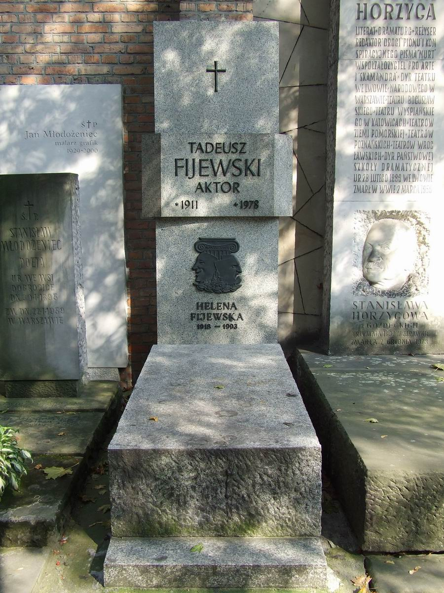 Tadeusz Fijewski, grób, Stare Powązki